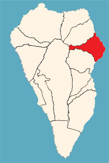 Ubicación del municipio de Puntallana